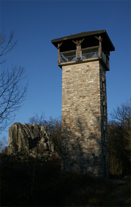 Aussichtsturm "Langer Heinrich" und Teufelsfels im Lützelsoon (Rheinland-Pfalz)